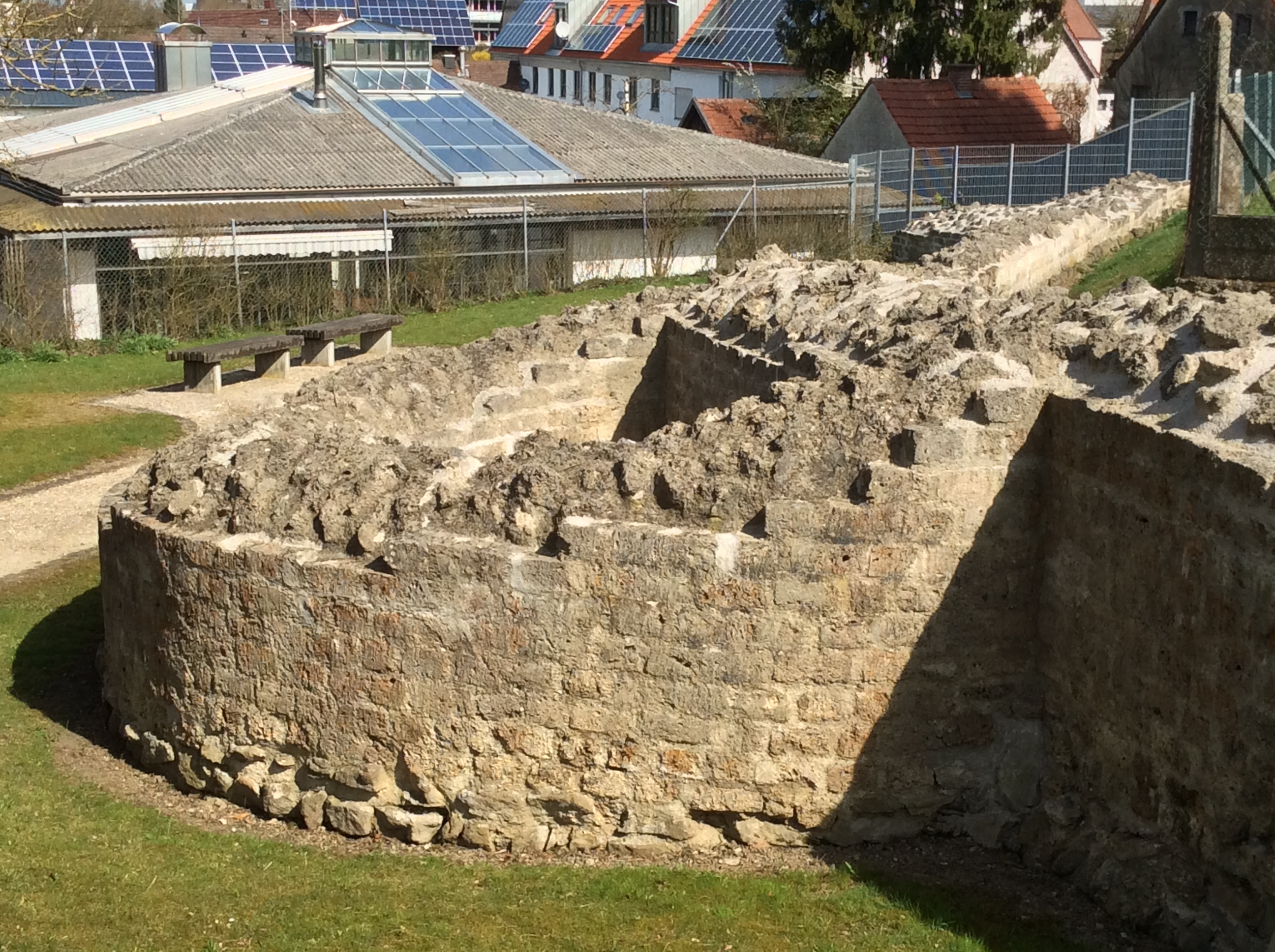 Konservierte Ruine im Archäologischen Park, Turm 9, des spätantiken Kastells Kellmünz in Deutschland (Caelius Mons).